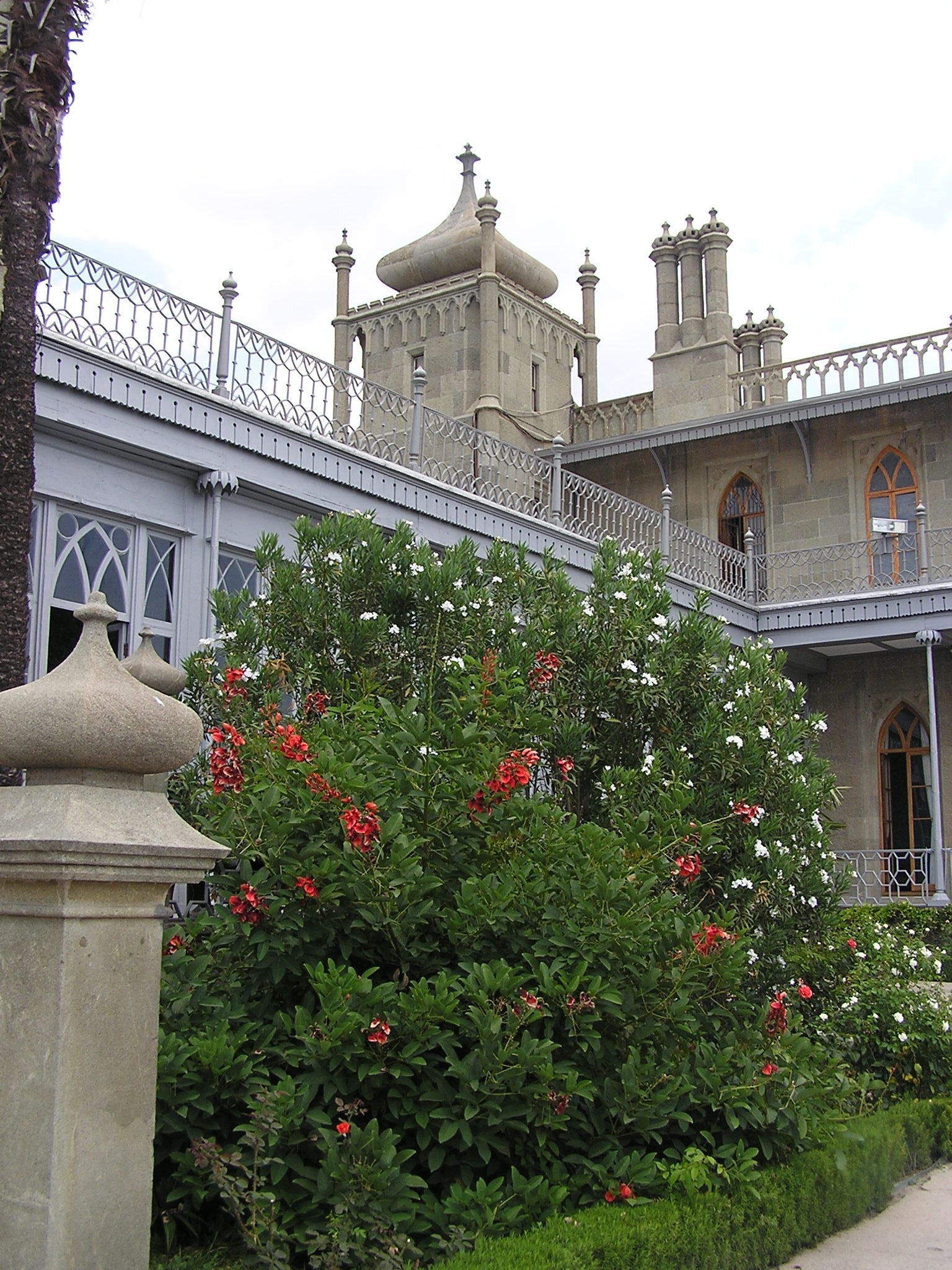 Алупка. Воронцовский дворец